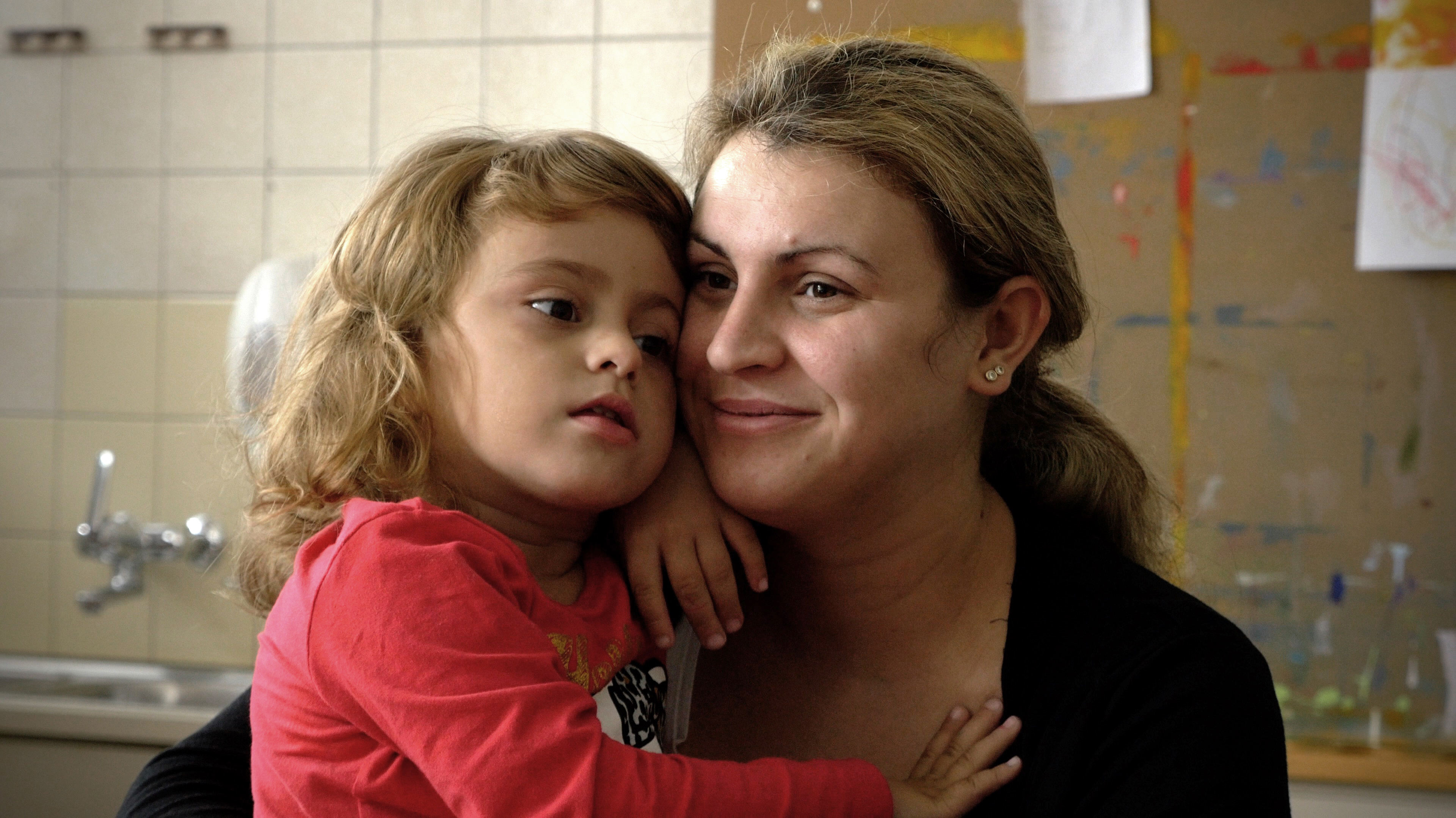 Albiana et sa maman Gentiana.Image du film de Fernand Melgar " À l'école des Philosophes"